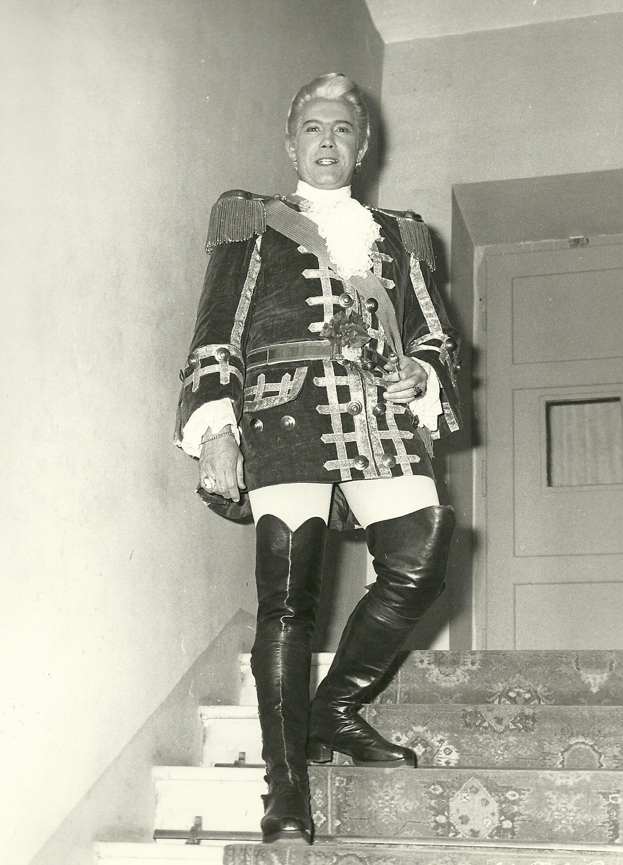 Il tenore Giuseppe Di Stefano al Teatro dell'Opera di Roma 1960 Il personaggio della foto non pare assolutamente Giuseppe di Stefano.